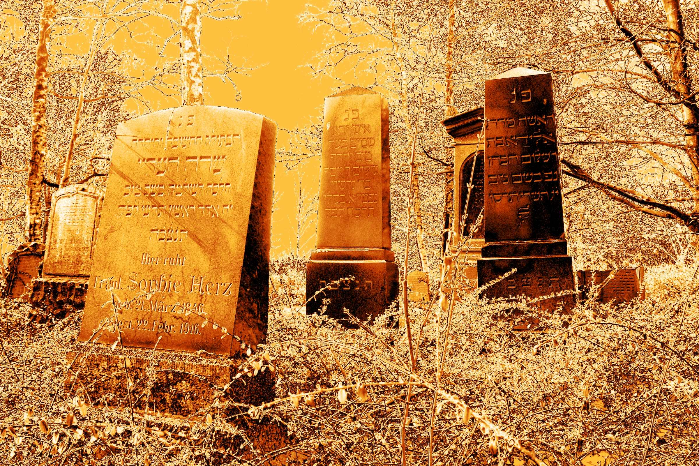 jüdischer Friedhof Neustadtgödens ca 2008 aufgenommen